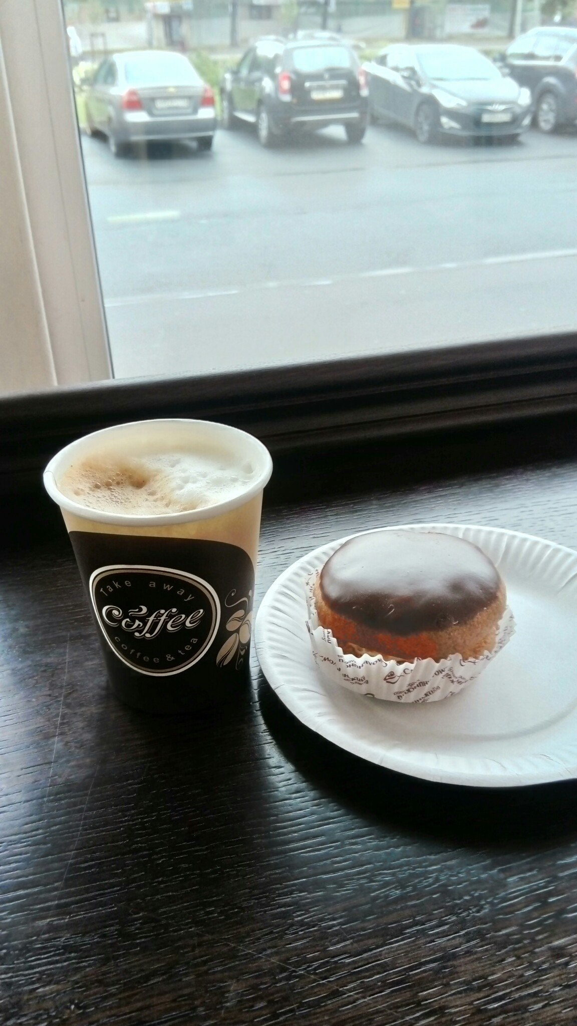 Пирожное Буше с кофе в кондитерской на проспекте Стачек, Петербург, Россия